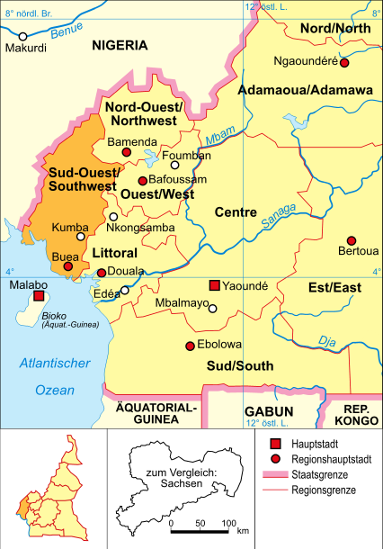 politische Karte von Kamerun (Provinz Sud-Ouest hervorgehoben)